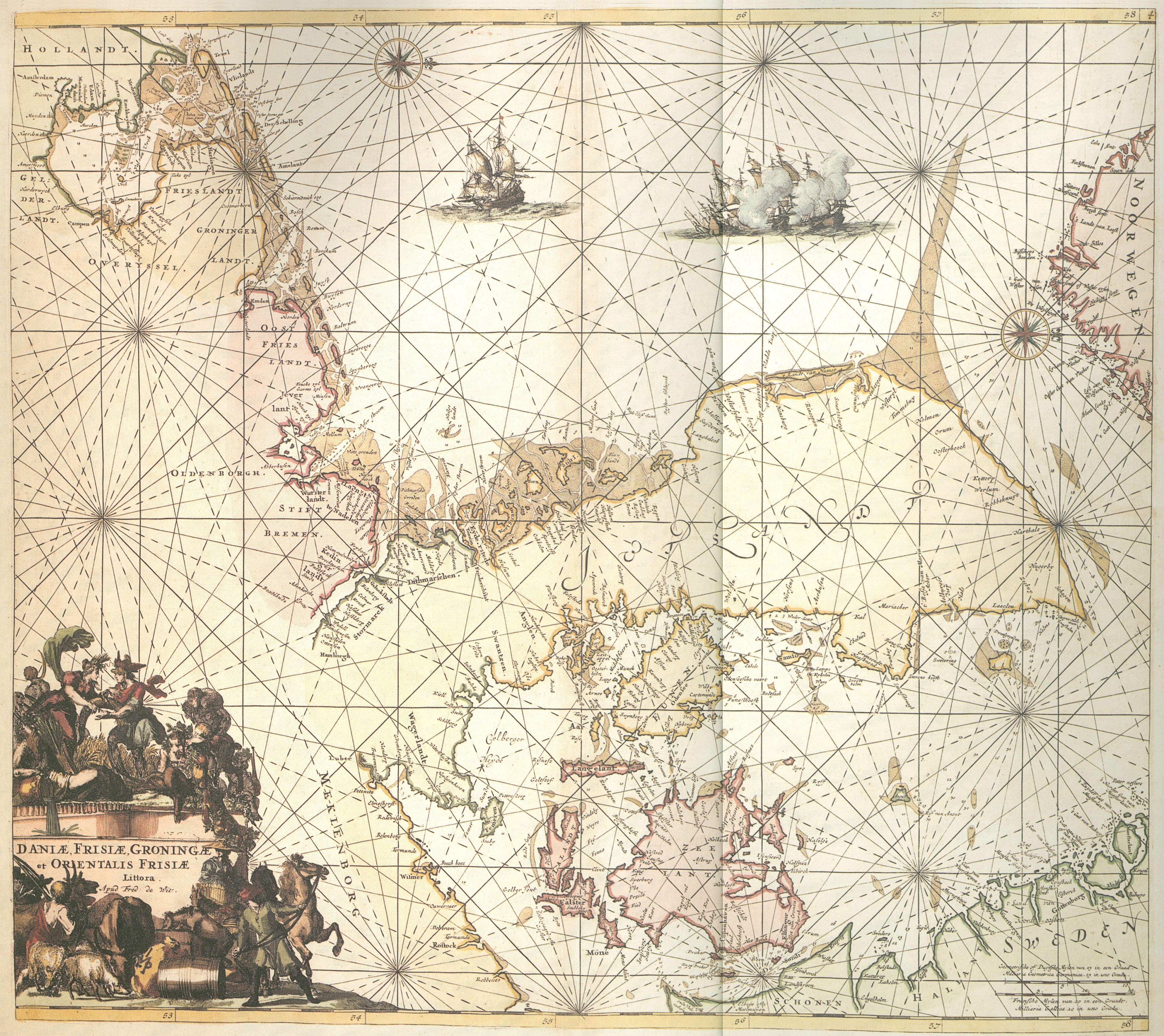 Daniae, Frisiae, Groningae, et Orientalis Frisiae Littora